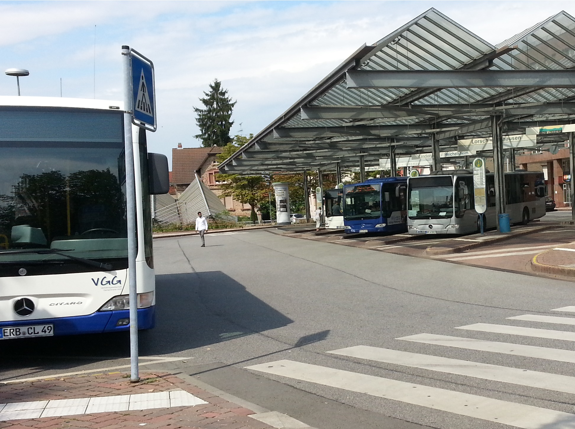 Zentraler Busbahnhof Bensheim am 14.8.2015. Man beachte die Blindenleitführung über die Bushalteplätze...